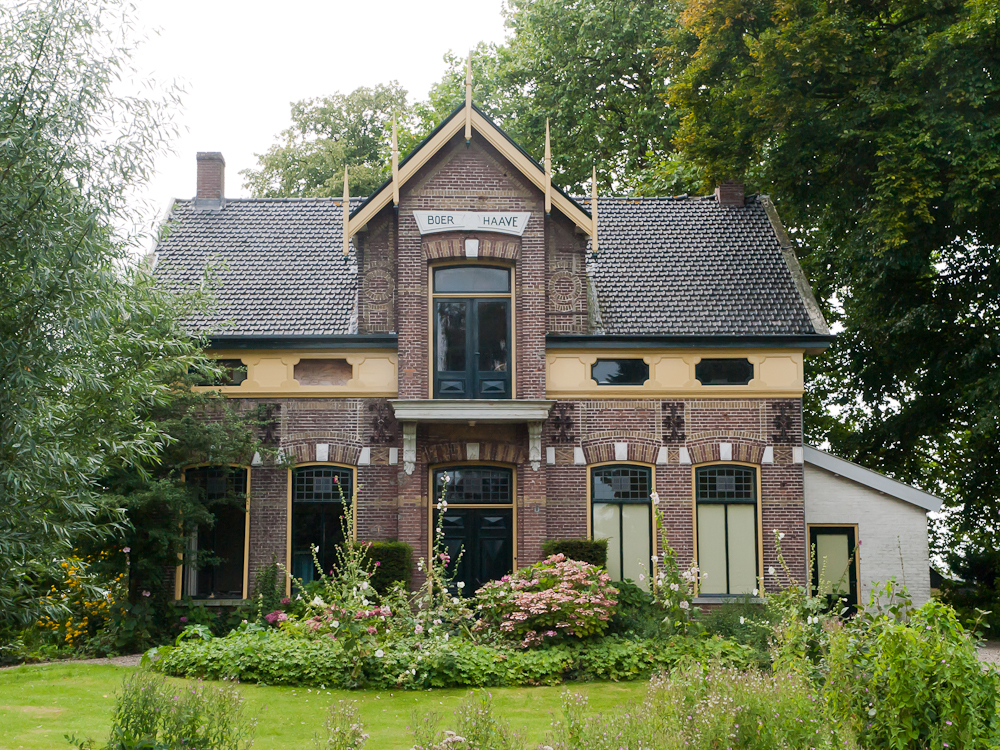 Vooraanzicht van monument Boerhaave aan de Kerkstraat 38 te Hoedekenskerke (Zeeland)